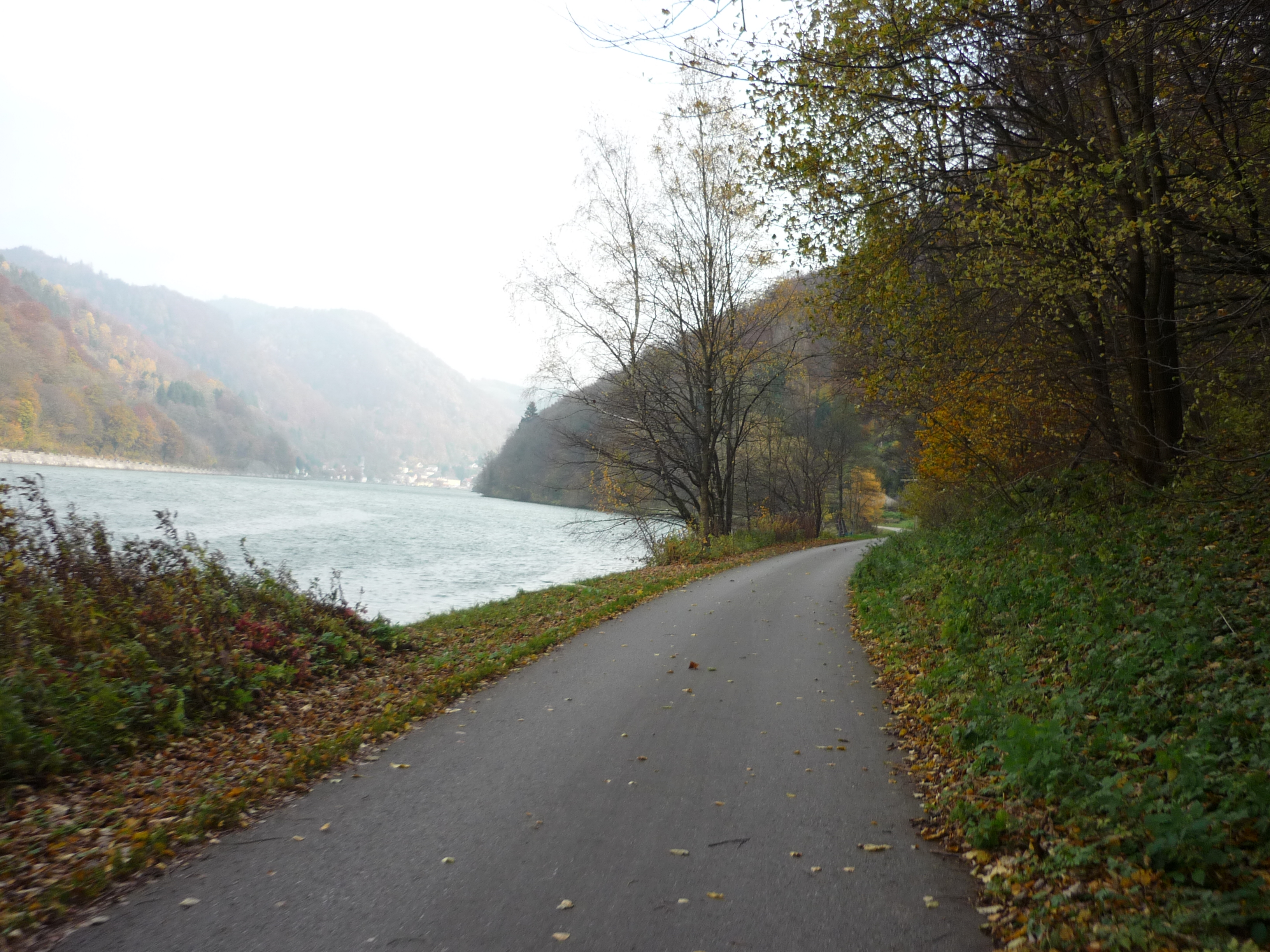 Der Mostviertler Donauradweg